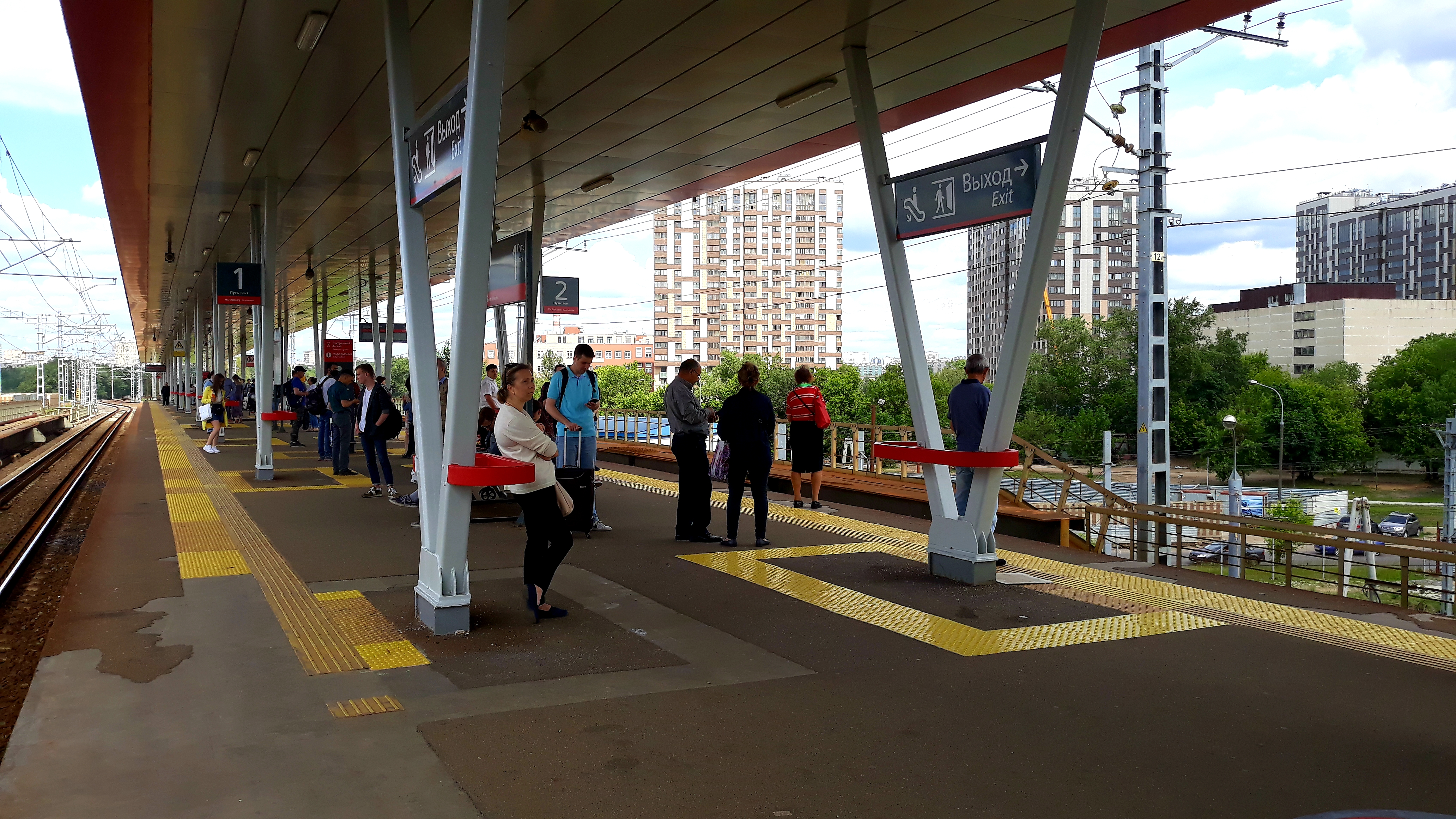 Платформа "Окружная", район Марфино, Москва